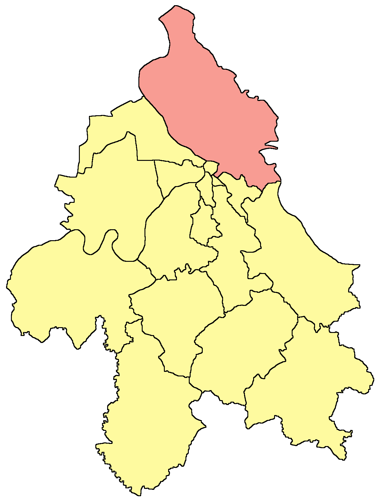 Belgrade municipality map